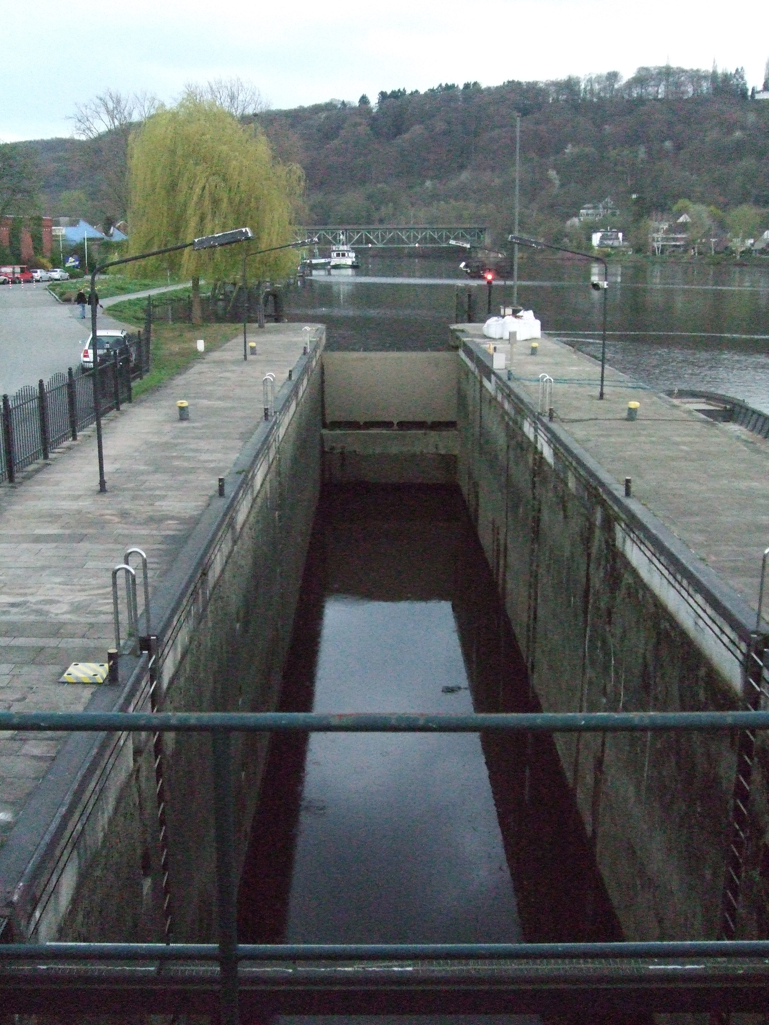 Schleuse, Kettwiger Stausee, Essen, Germany